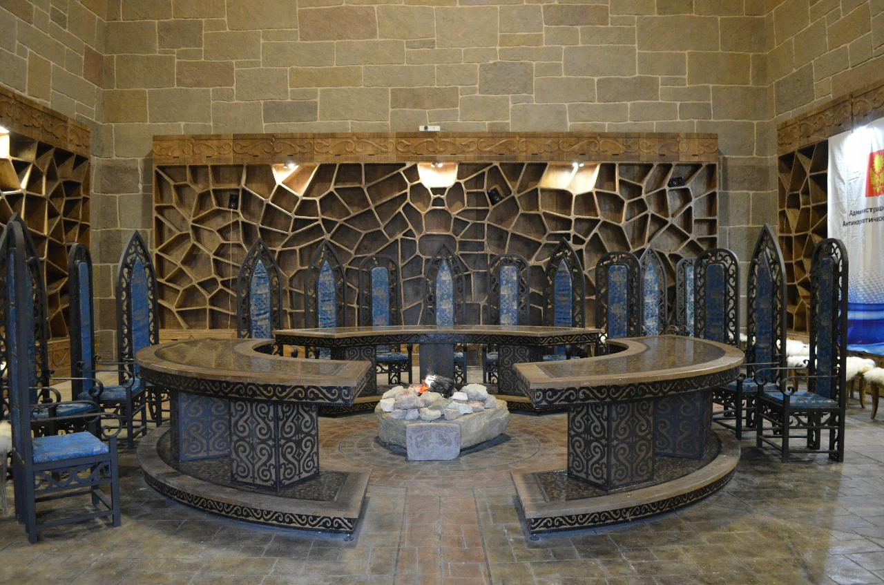 Экскурсия в горную Ингушетию, 30.06.2019